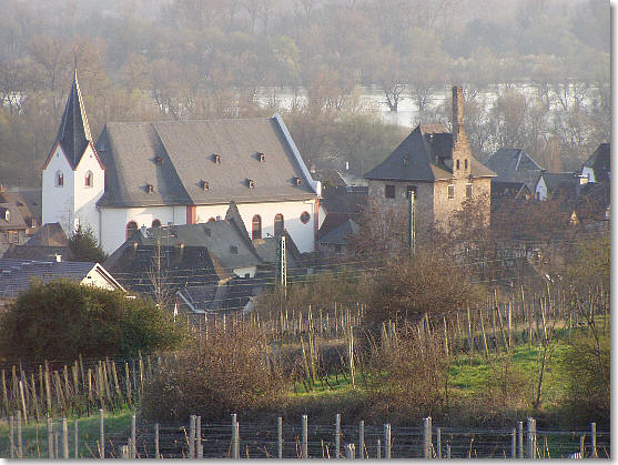 Hattenheim